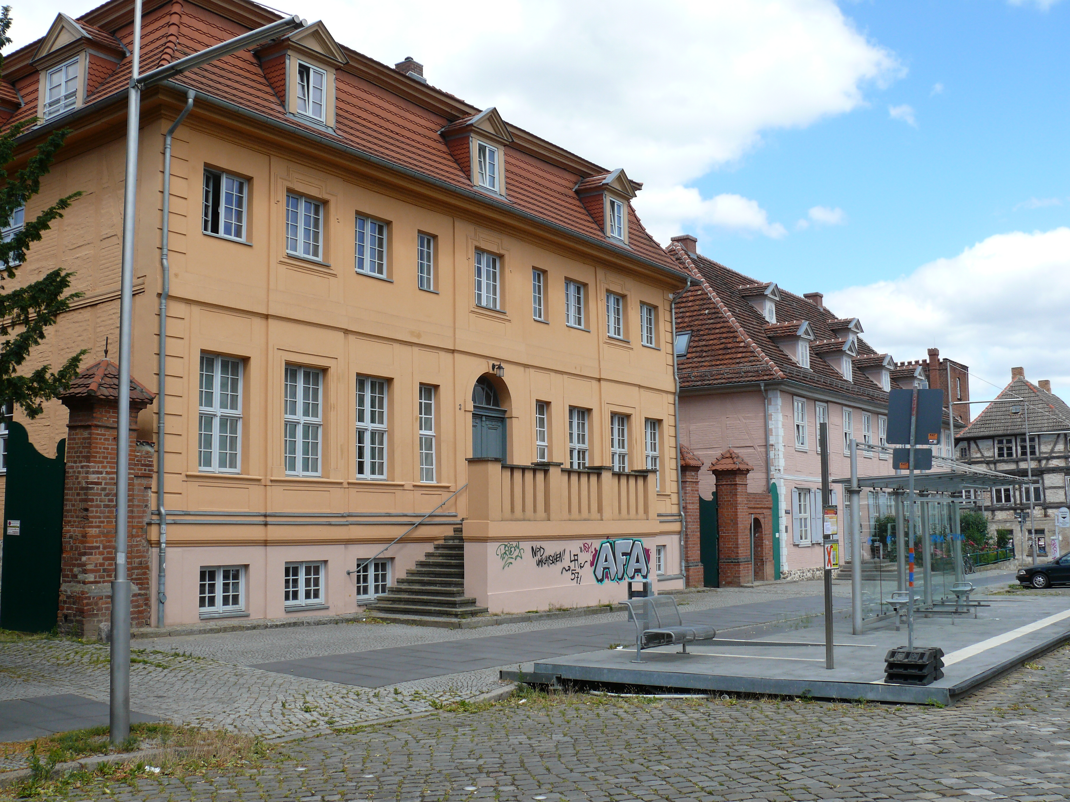 Das Gebäude "Schelfmarkt 2" in Schwerin.